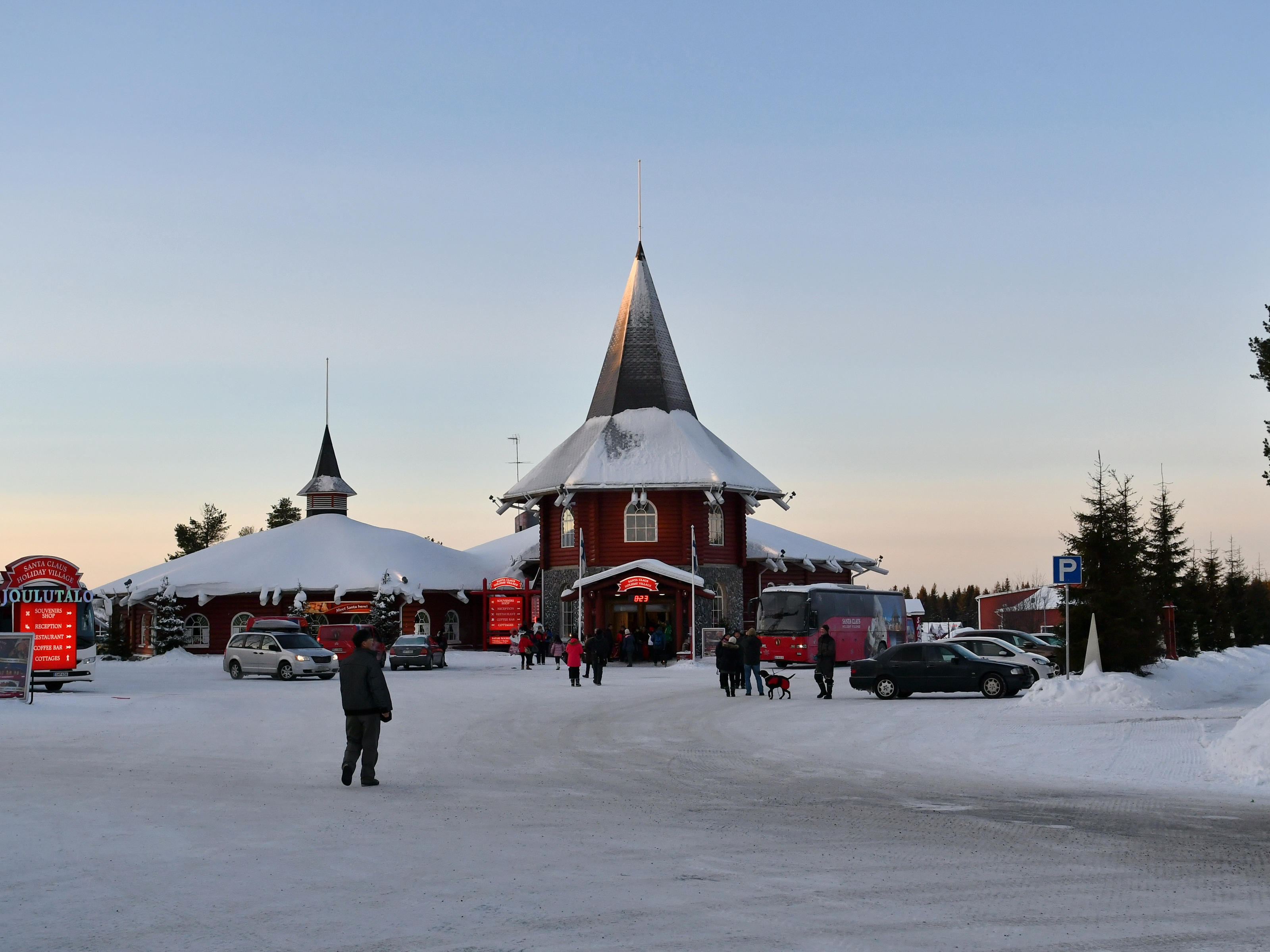 芬兰罗瓦涅米圣诞老人村